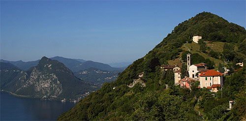 Brè (ob Lugano) mit Blick zum Monte San Salvatore